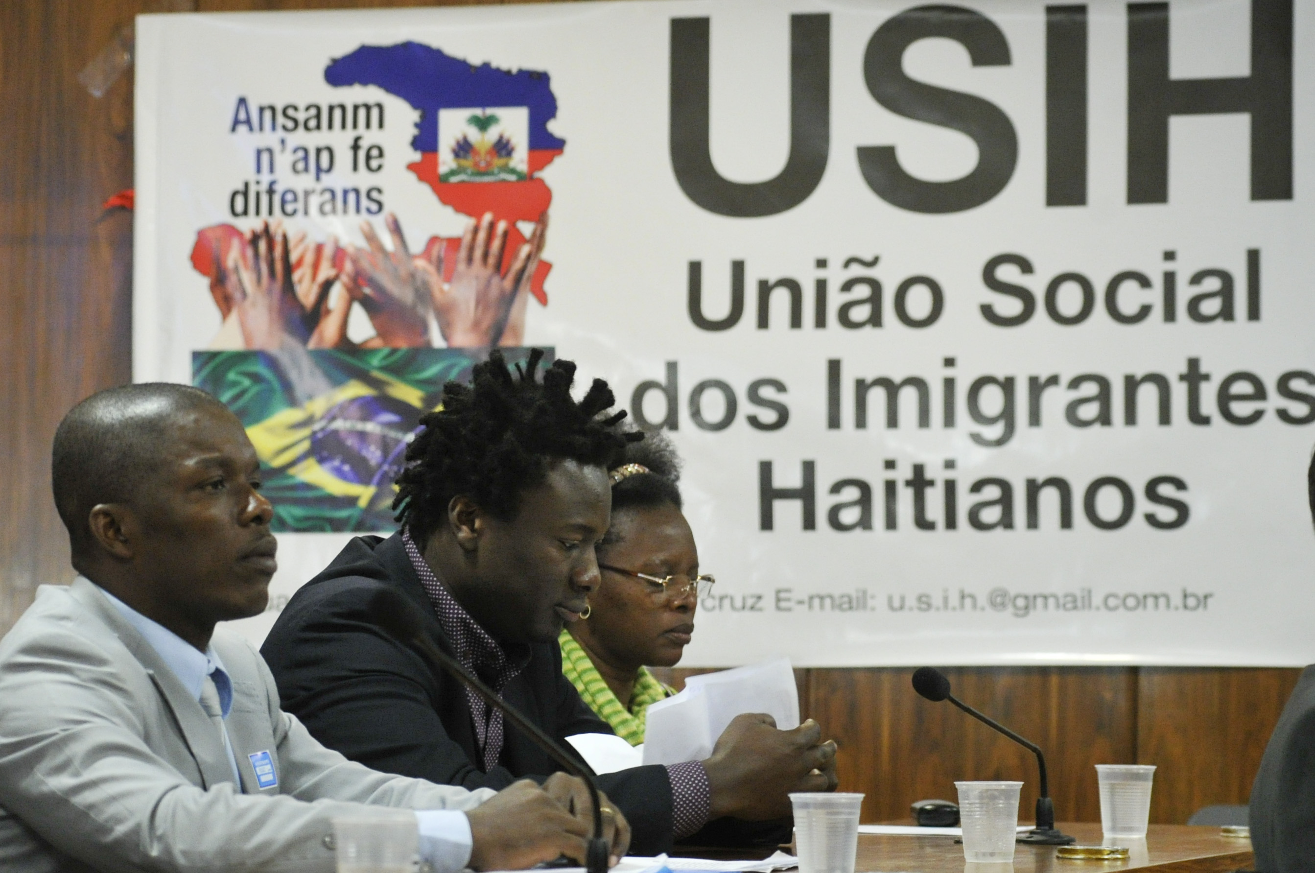 A Comissão de Direitos Humanos e Legislação Participativa (CDH) realiza audiência pública interativa sobre a situação dos haitianos no Brasil. Entre os convidados estão representantes do Ministério do Trabalho e Emprego, da Secretaria de Direitos Humanos da Presidência da República e da Pastoral do Migrante no Estado de São Paulo. Foto: Geraldo Magela /Agência Senado